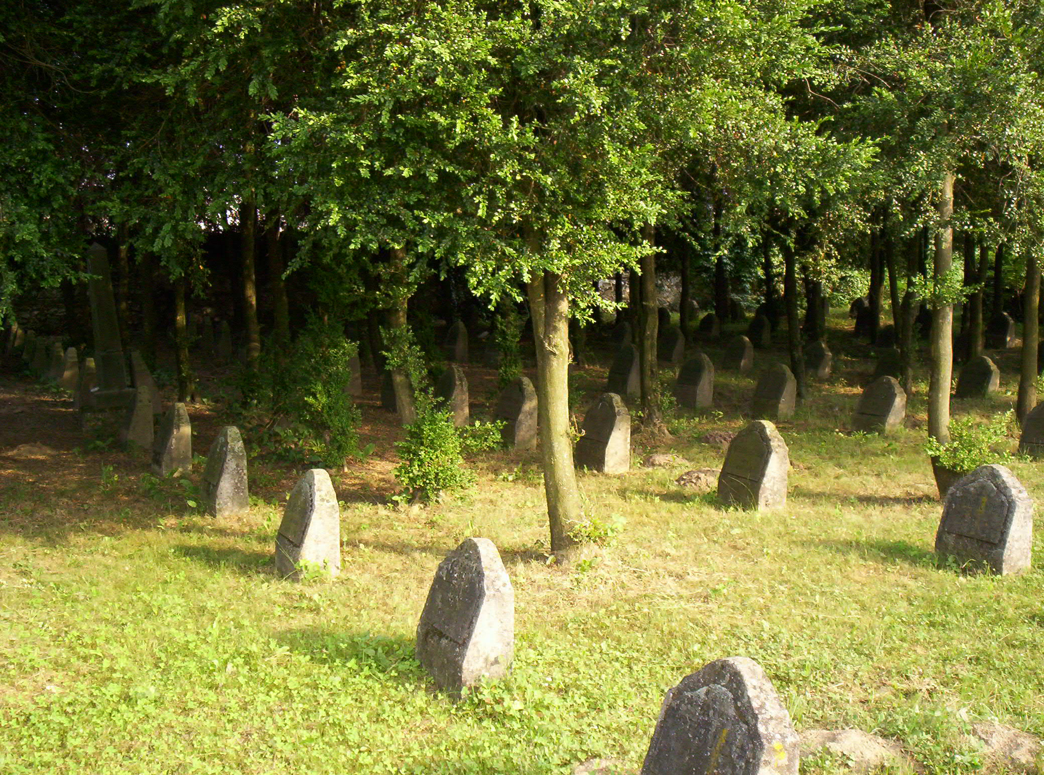 Military graves of the World War I in the Alsóvárosi cemetery in Pápa, Hungary Első világháborús katonasírok a pápai Alsóvárosi temetőben